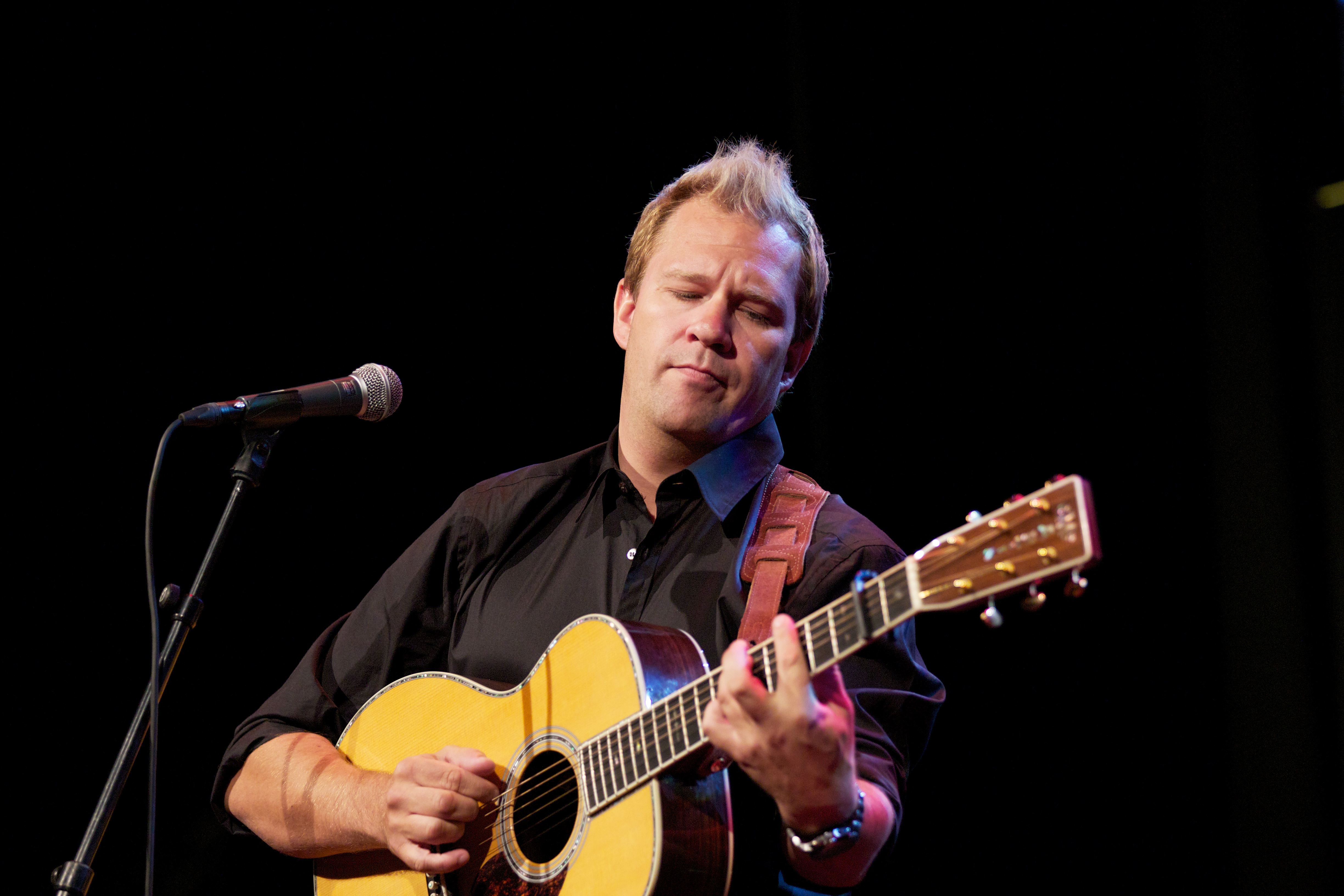 Bjarte Hjelmeland. Foto: Eirik Helland Urke